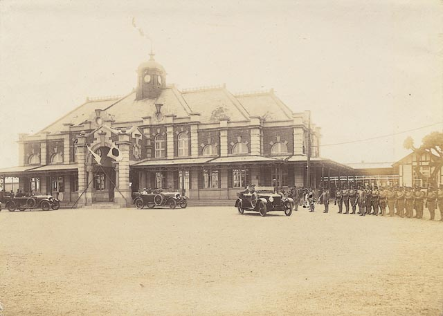 中文（台灣）: 新竹州知事梅谷光貞，率同地方官員於西元1923年（大正12年）4月19日，在新竹停車場（即今新竹火車店）迎接裕仁太子來台巡視